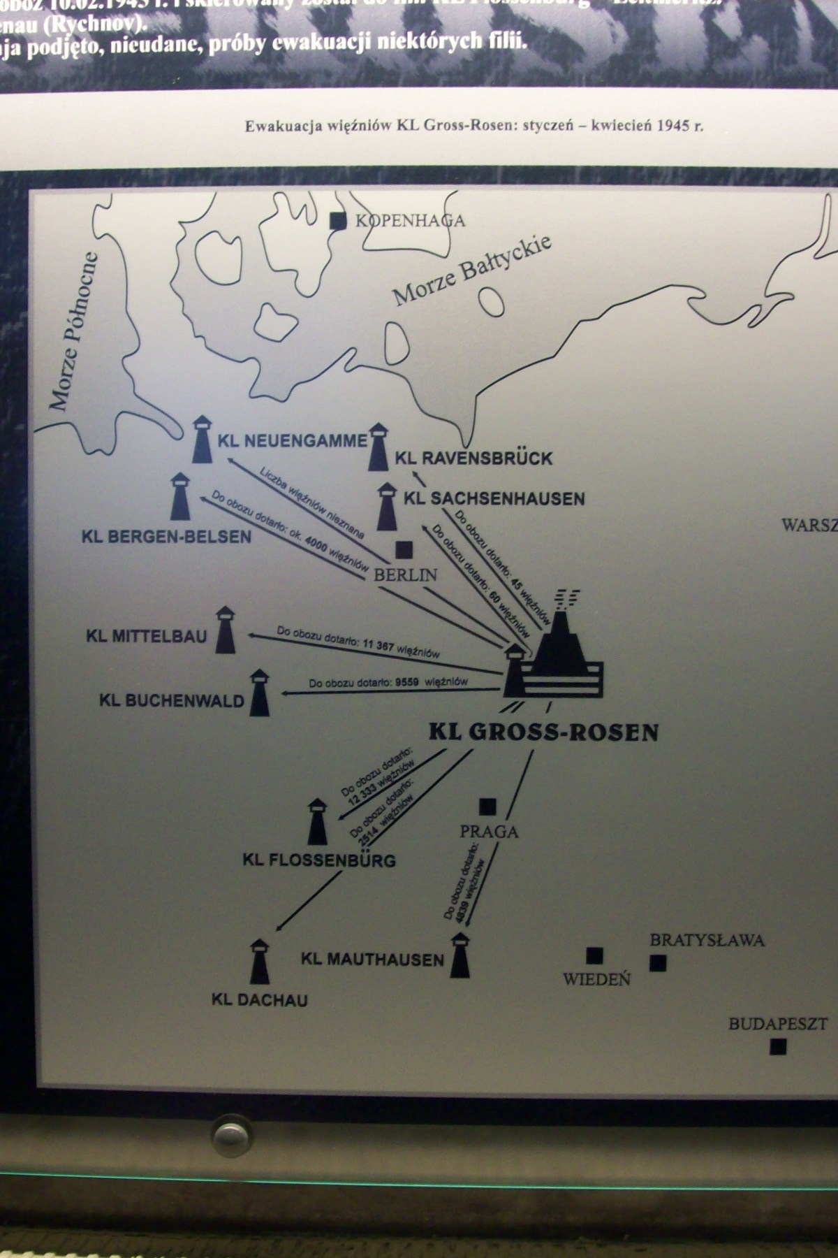 Informacje znajdujące się w muzeum KL Gross-Rosen w Rogoźnicy na Dolnym Śląsku